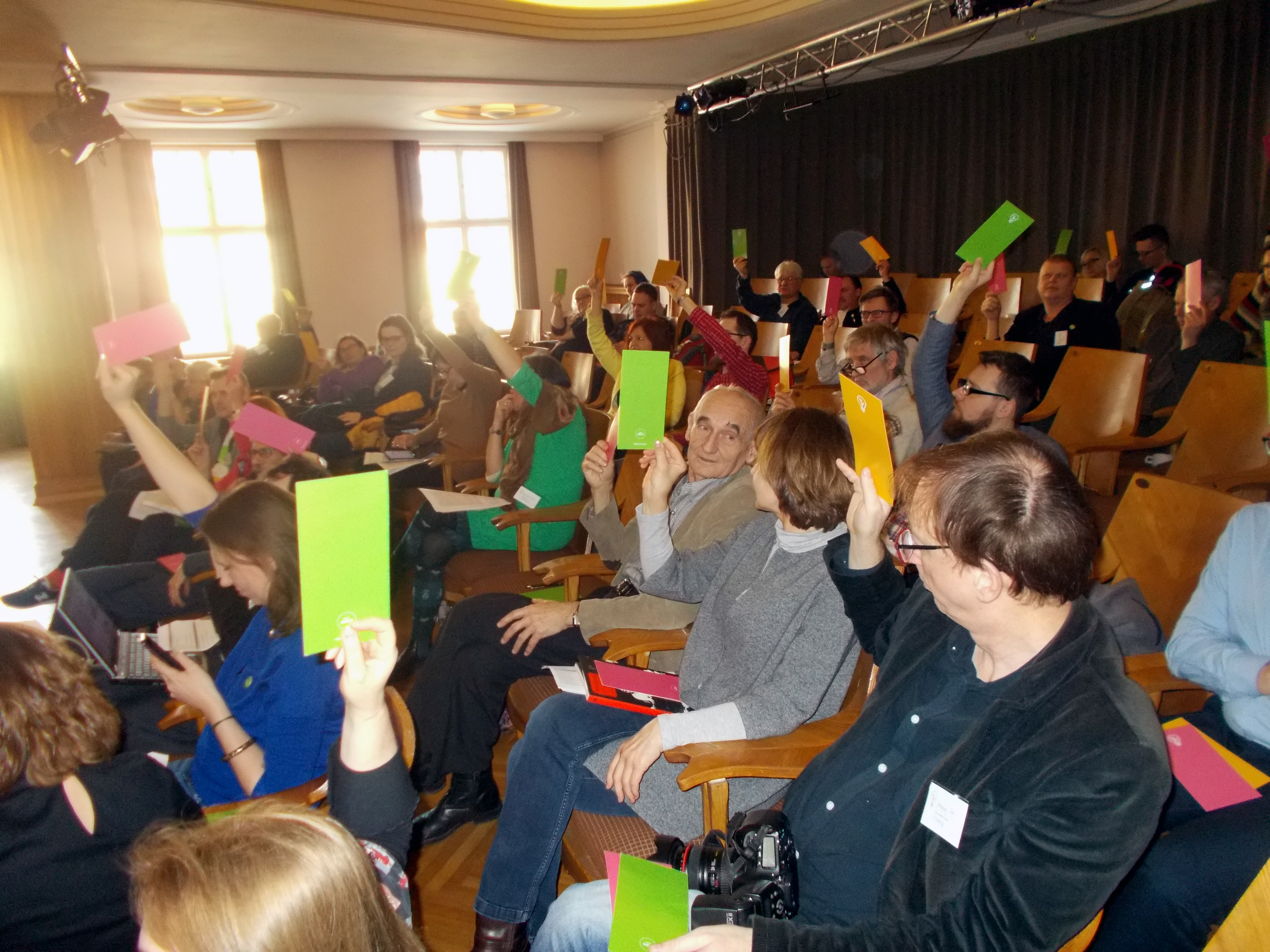 Obrady kongresu Partii Zieloni w Warszawie w lutym 2018 r.